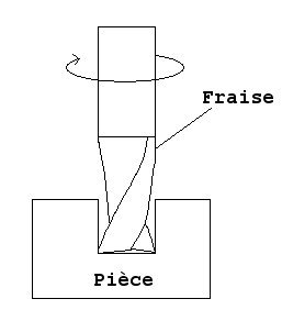 Shéma d'une fraise à rainurer 2 dents.